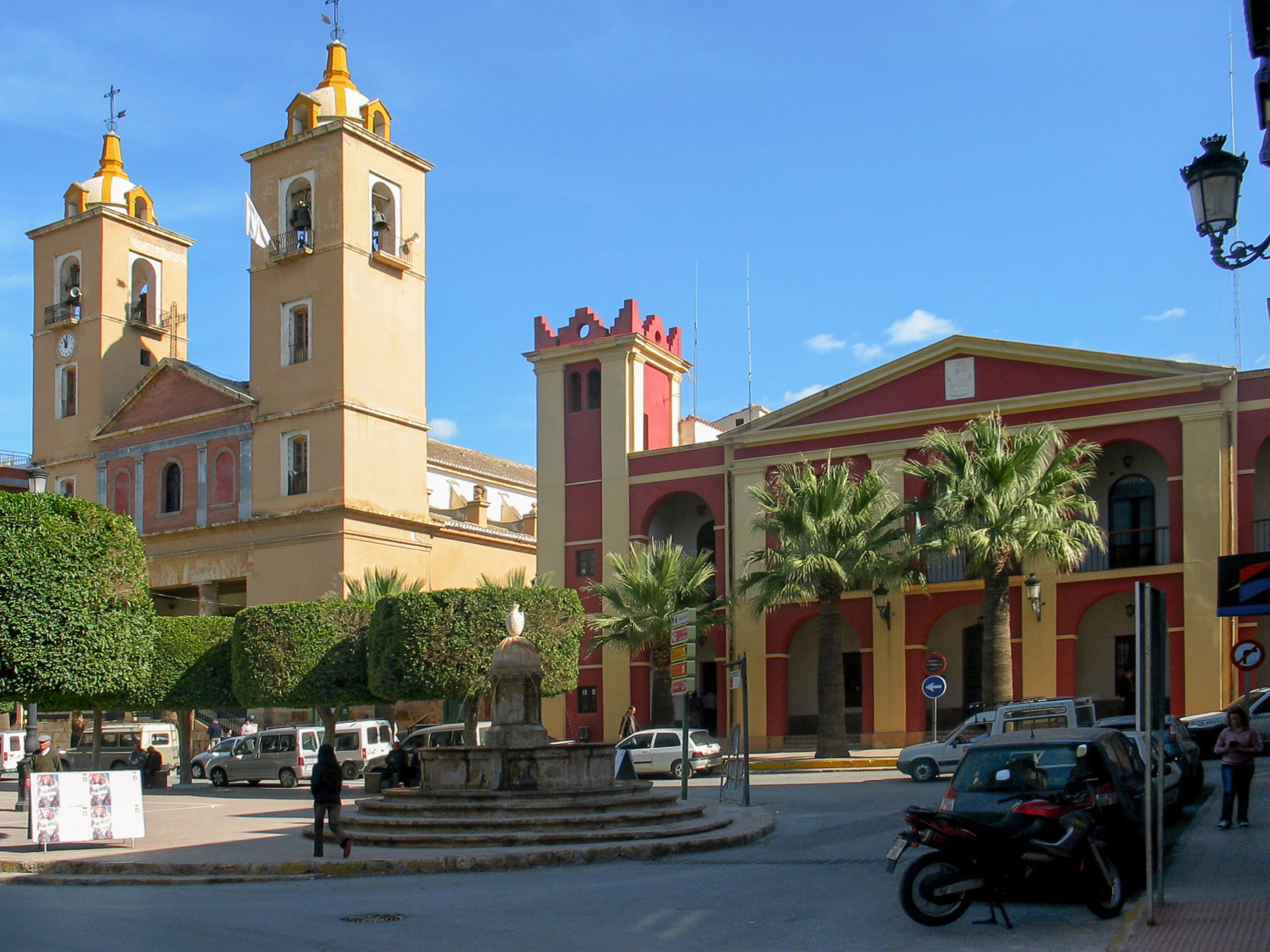 Plaza principal de Berja, (Almería, España), con la Iglesia y el Ayuntamiento